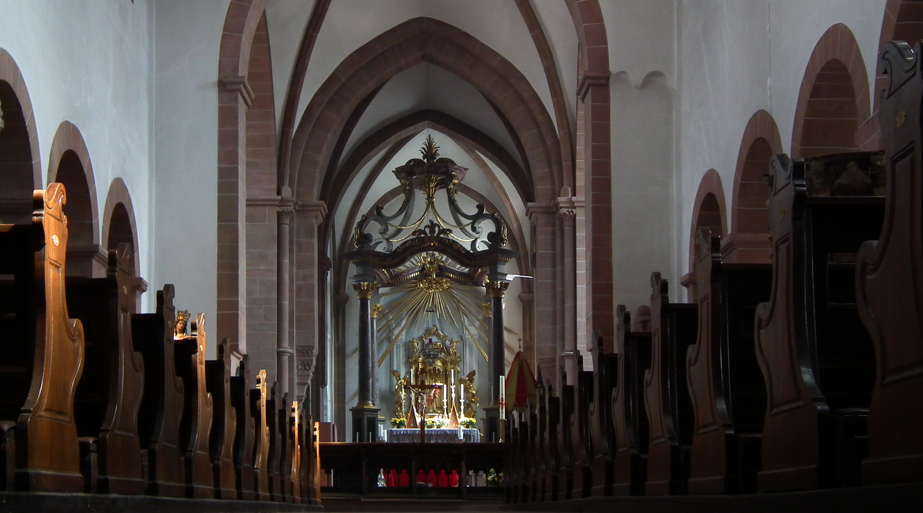 Stiftskirche St. Peter und Alexander, Mittelschiff, Hochaltar mit Baldachin auf Marmorsäulen (1772) Aschaffenburg, Germany